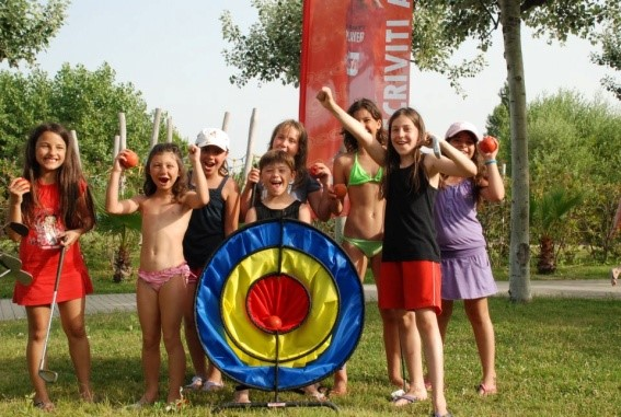 Meta koju treba gadjati